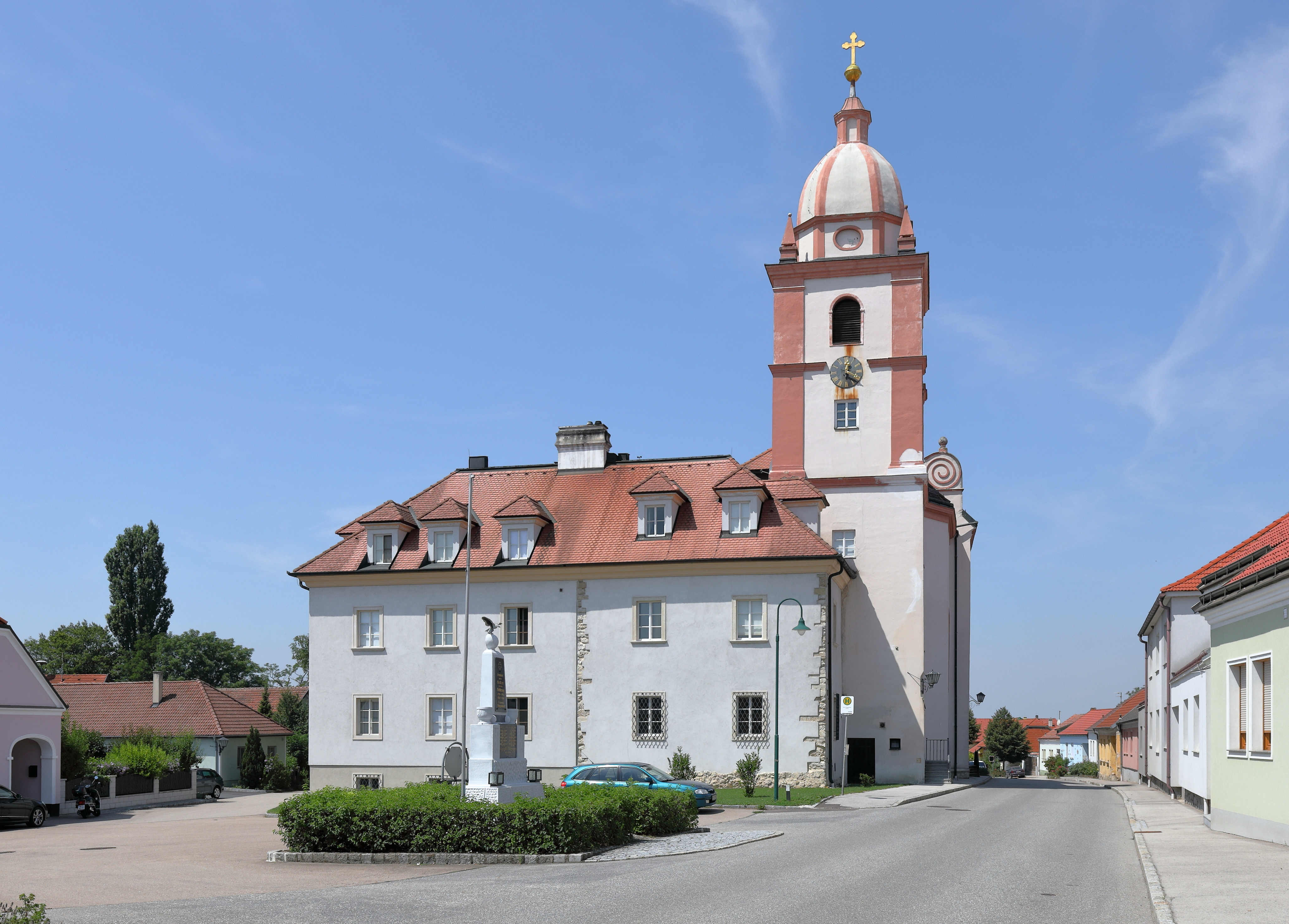 Ostansicht der Wallfahrts- und Pfarrkirche Mariä Geburt und dem angebauten Pfarrhof, der heute als Benediktinerkloster St. Josef genutzt wird, in Maria Roggendorf, ein Ortsteil der niederösterreichischen Marktgemeinde Wullersdorf.